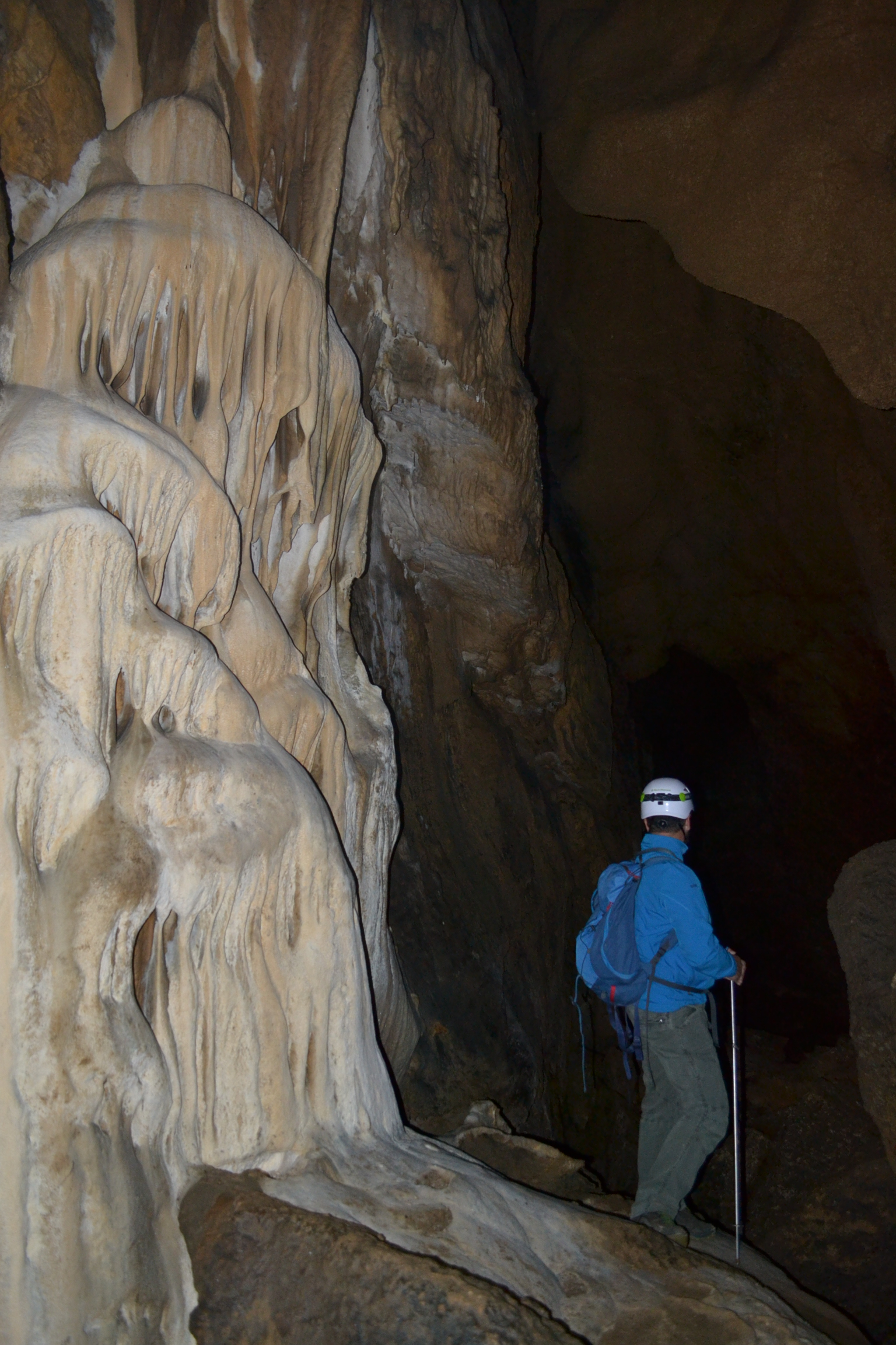 Најистакнутији пећински украси